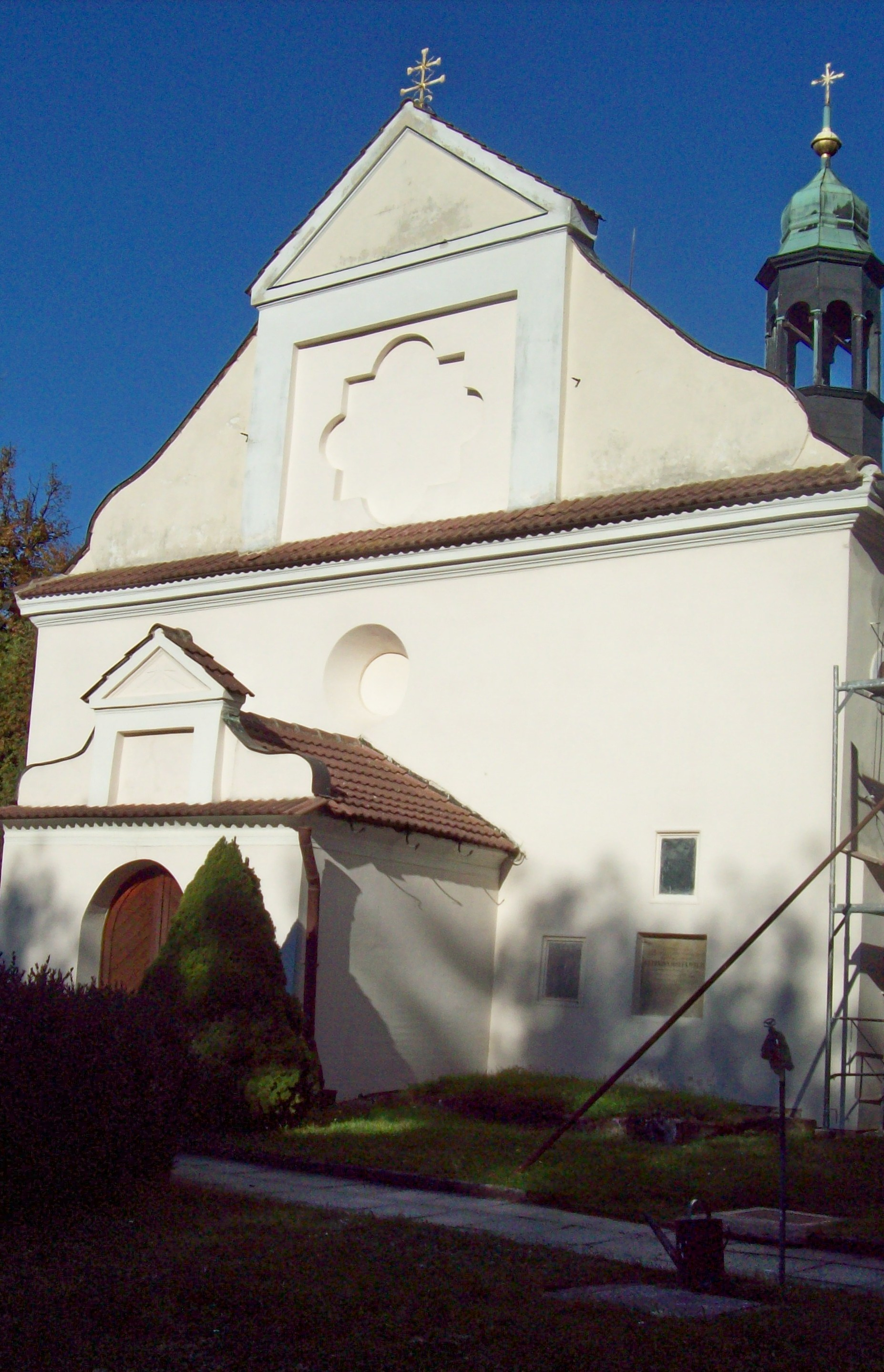 Česky: Kostel Nejsvětější Trojice na Chloumku, ul. Lesní, Mělník. Předsíň s volutovým štítem.